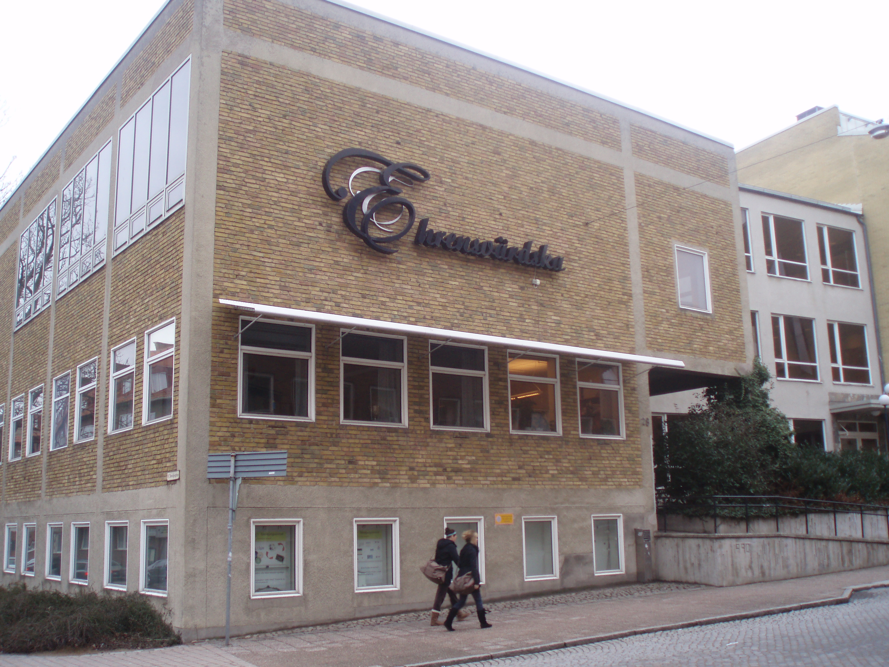 Ehrensvärdska Gymnasiet, Karlskrona